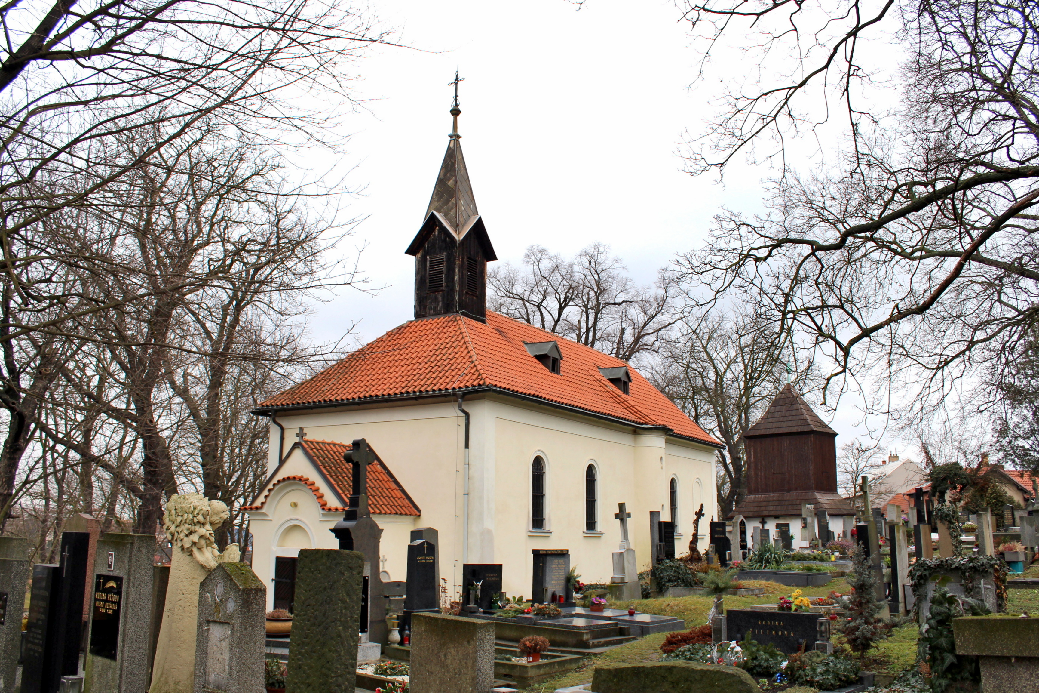 Kostel svatého Vavřince, Butovice - Jinonice